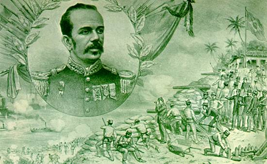 Marechal Floriano Peixoto e a Revolta da Armada, em bico-de-pena de Angelo Agostini, na revista D. Quixote de 29 de junho de 1895.